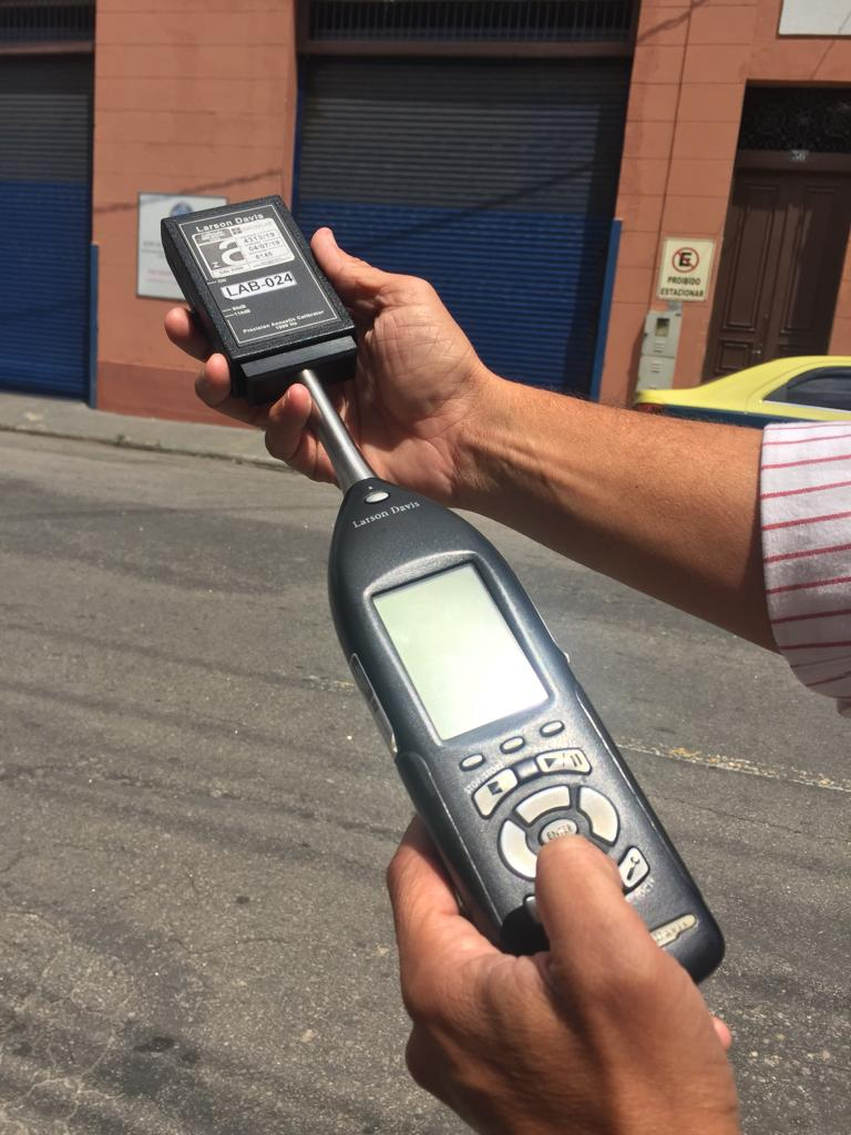 O medidor e analisador em tempo real 831, possui classe de precisão 1, atende a IEC 61672, é robusto, versátil e pode ter sua configuração ampliada mesmo depois da aquisição. O 831 possui certificado de aprovação de modelo junto ao PTB; display em português; memória não volátil; interface USB e alimentação através de pilha AA. Atende a NBR 10.151:2019 Calibrador Acústico - Nível: 94 e 114 dB à 1 KHz - Orifício de 1/2" - Opcionais não incluso: ADP031 - Adaptador p/ microfones de 3/8"